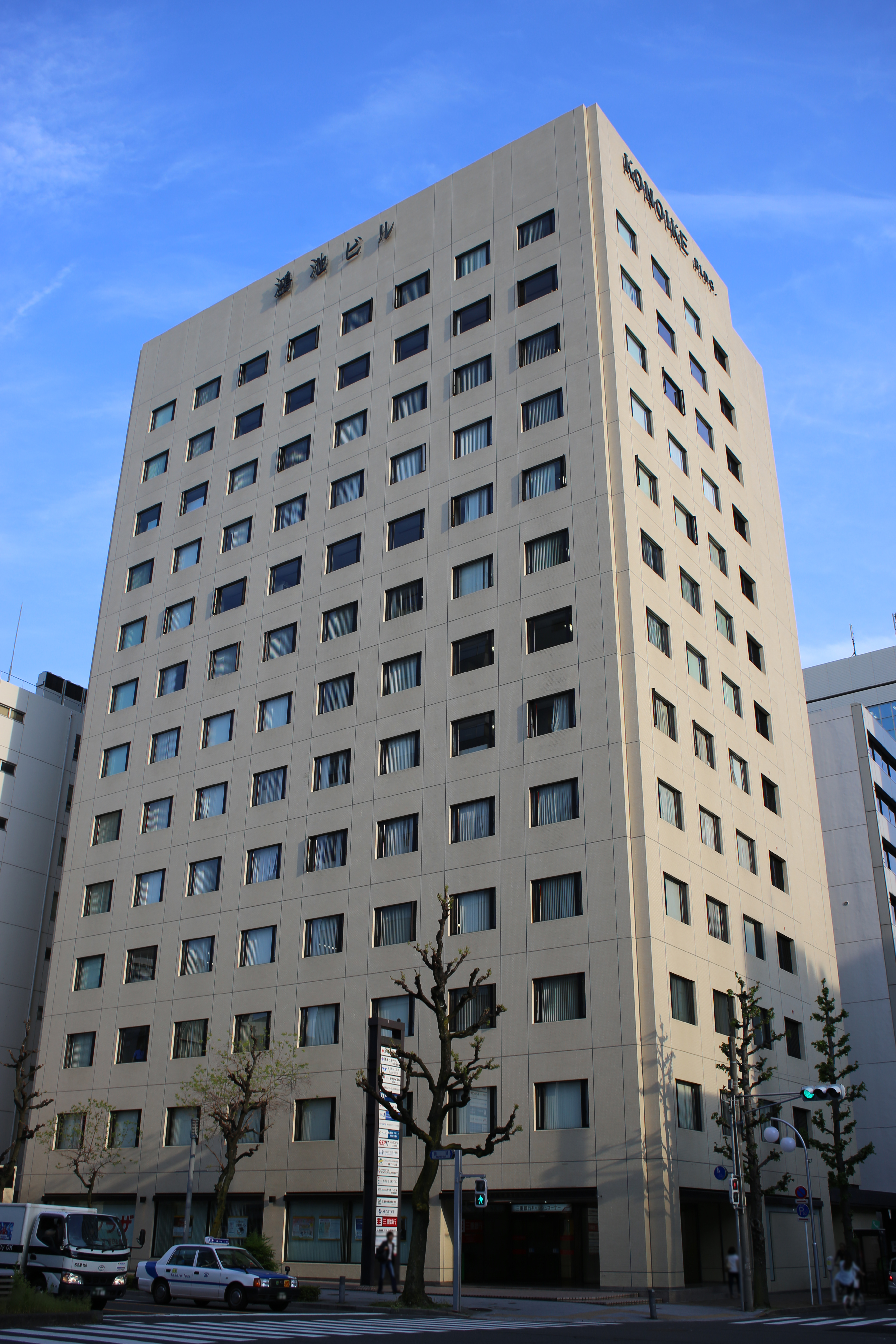 名古屋市中区錦二丁目の名古屋鴻池ビルを北側公道西側より撮影。ただし、人物・ナンバープレートにつき画像処理済み。